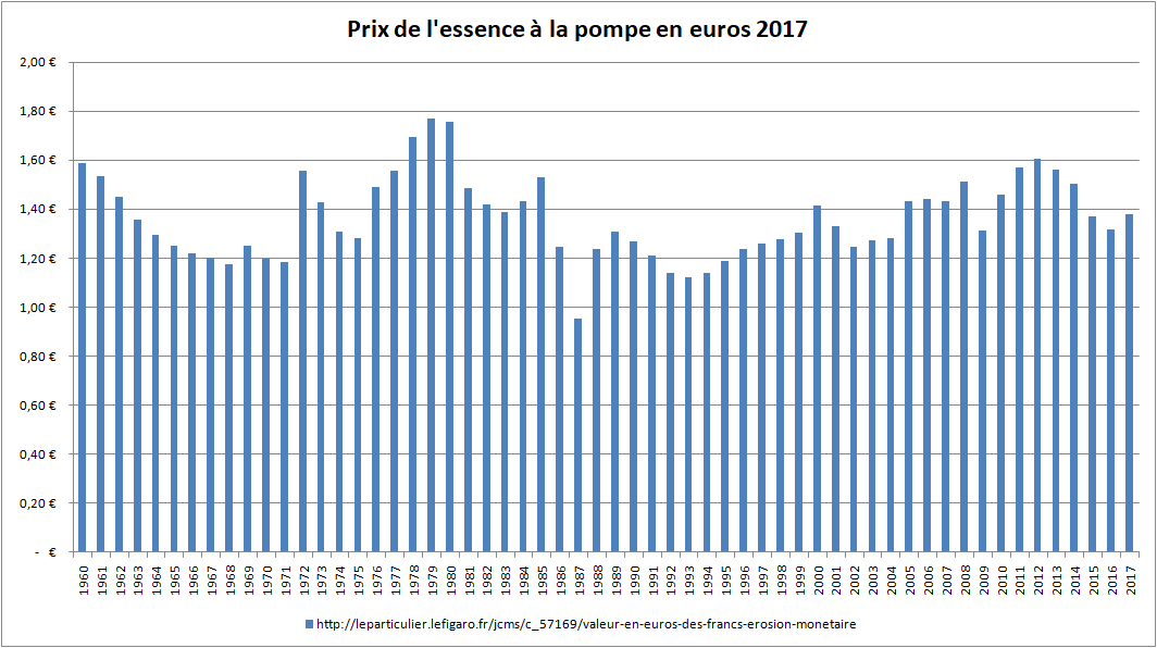 Prix de l'essence à la pompe en France en euros 2017